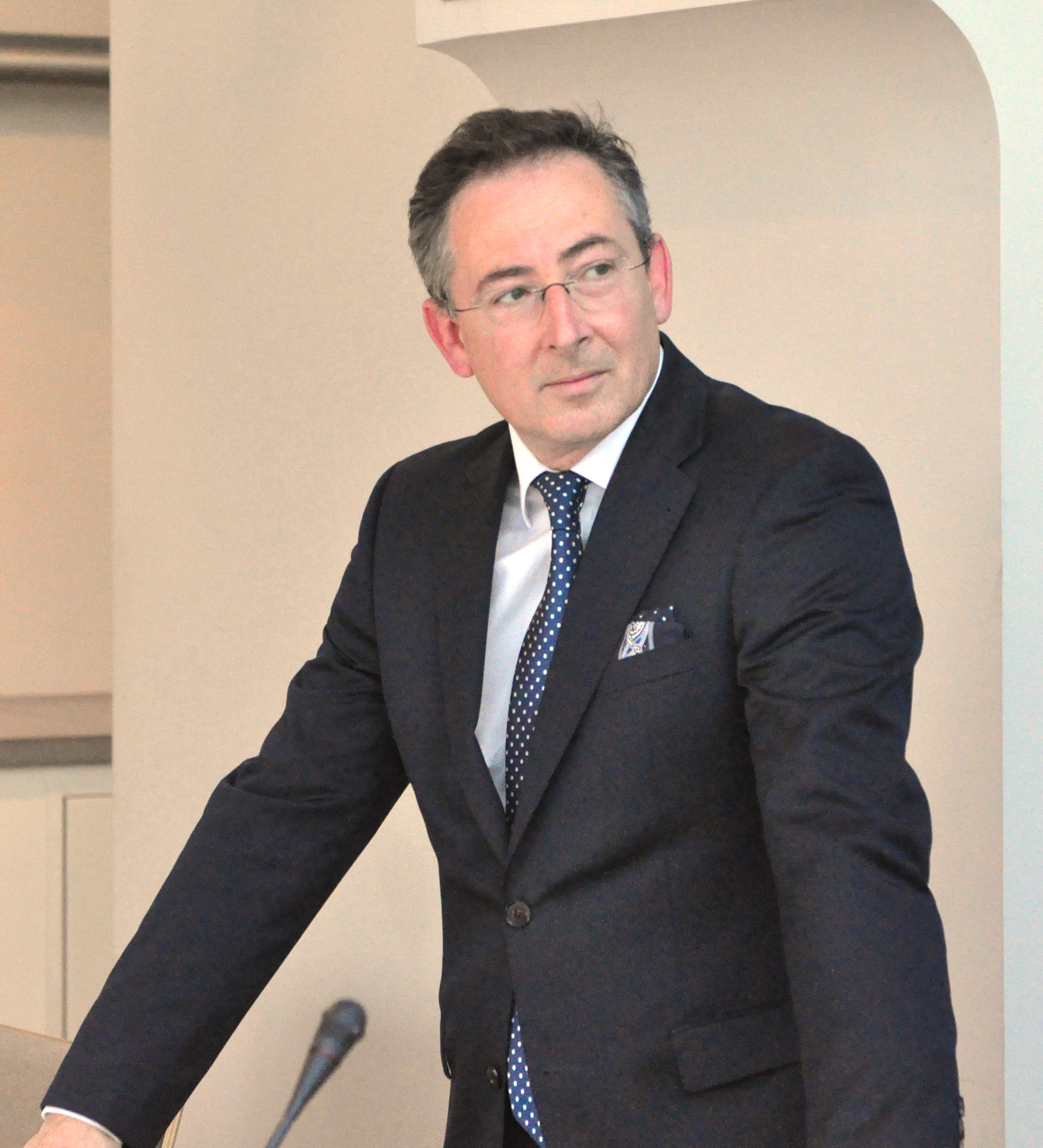 Minister Bartłomiej Sienkiewicz na spotkaniu ministrów SW państw Trójkąta Weimarskiego w Krakowie